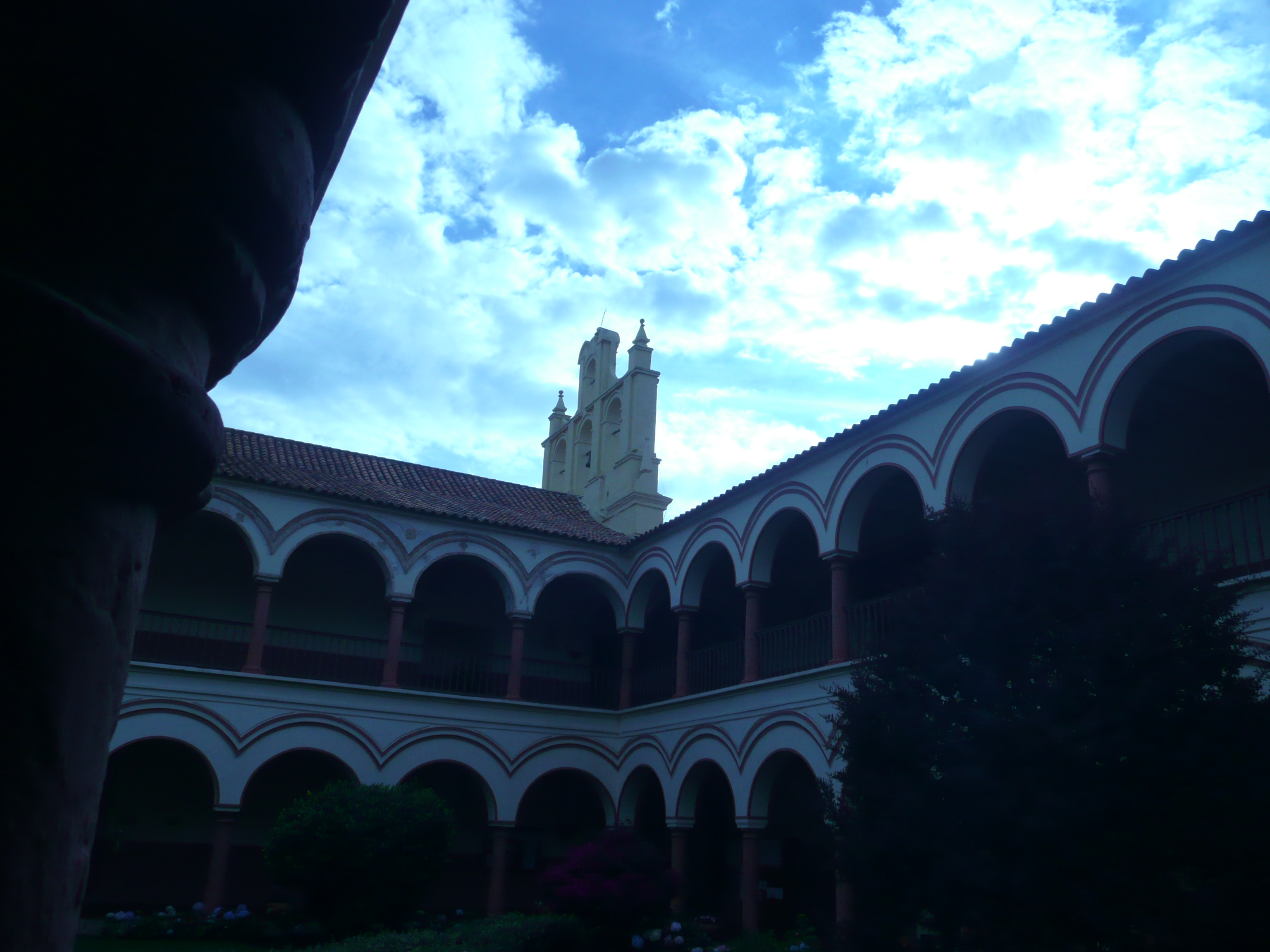 Convento de San Agustín - Tunja, Boyacá Colombia